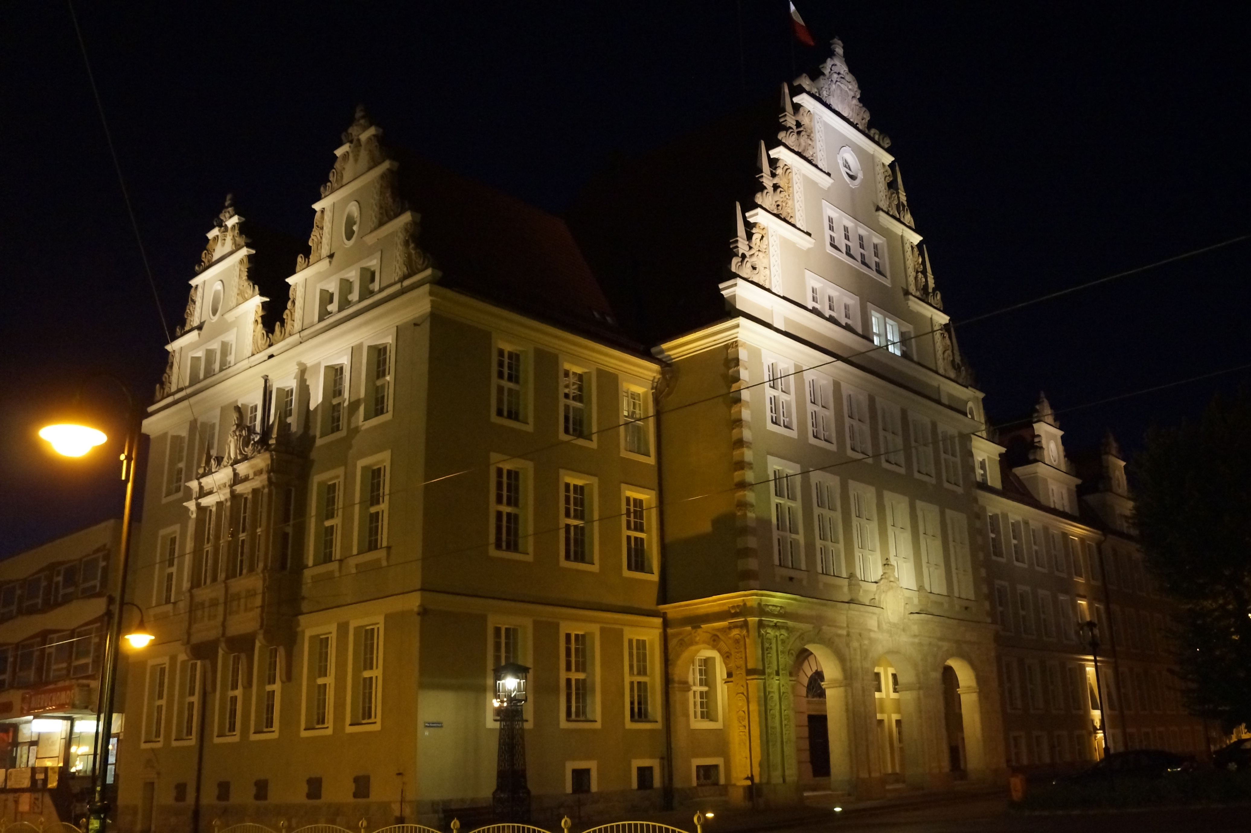 Elbląg, Plac Konstytucji 1 - dawny dom towarowy, poł. XIX w., obecnie Sąd Okręgowy